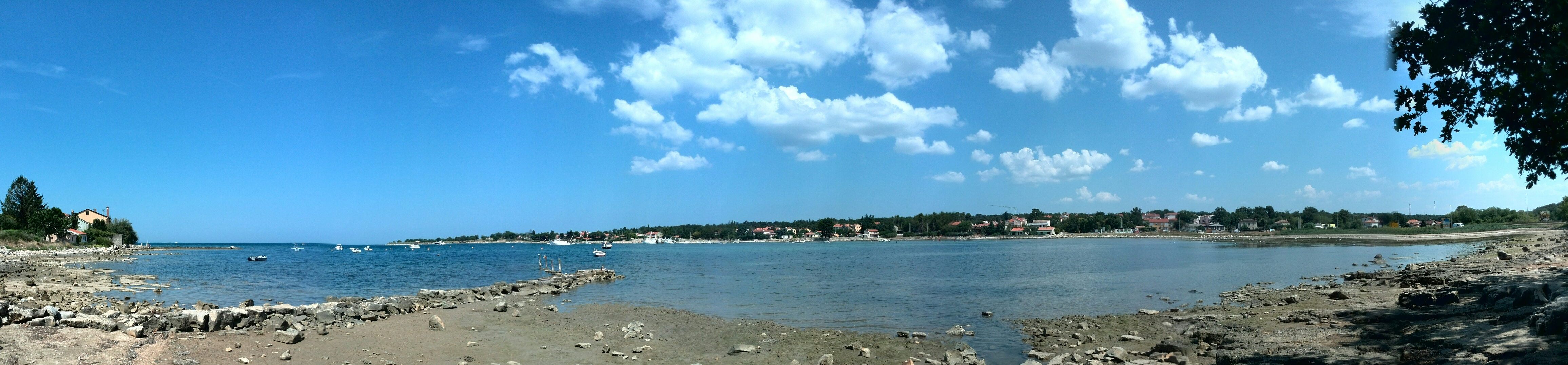 Karigador, Istria